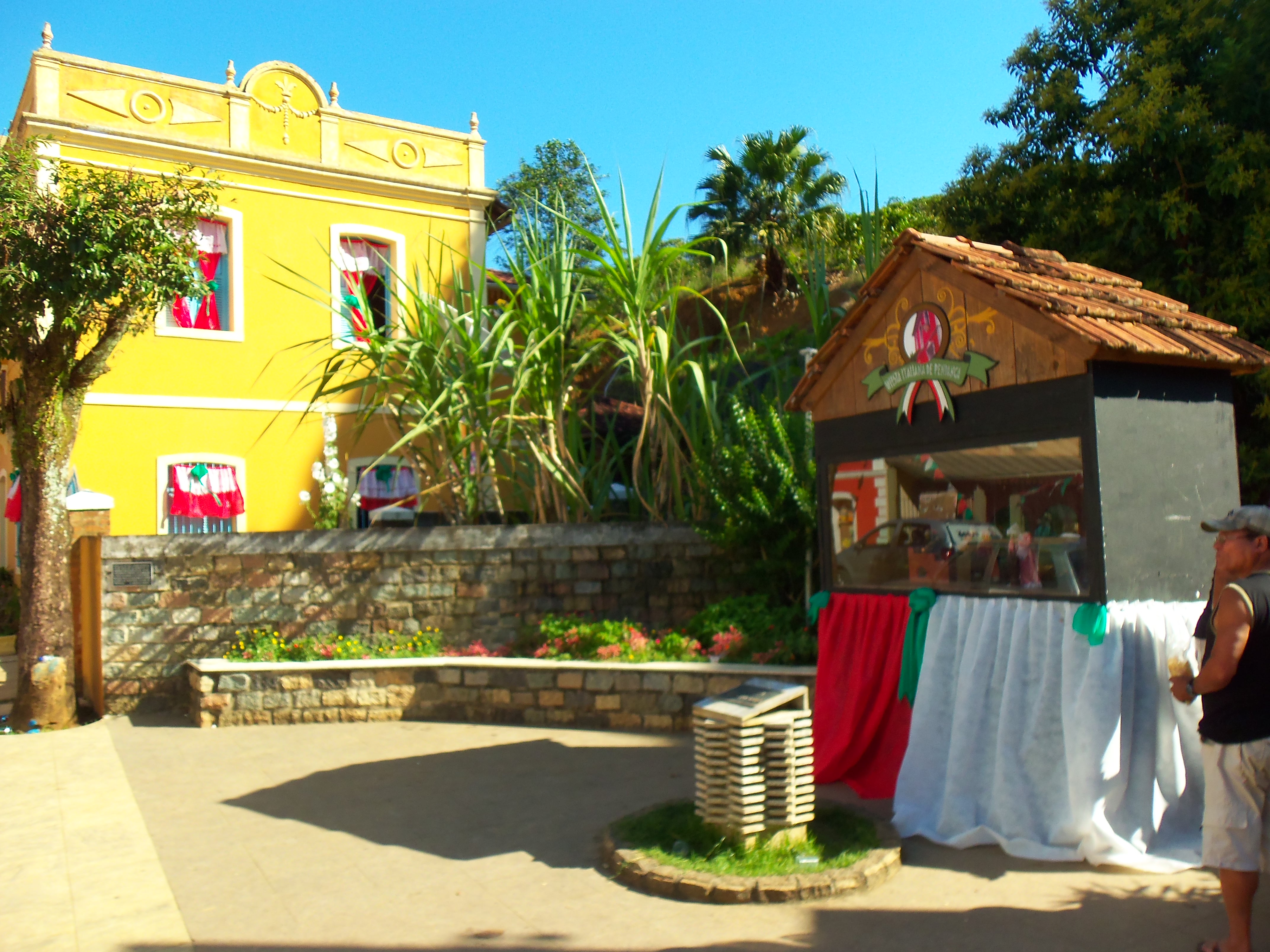 Piazza Pozzato Luigi, em Pendanga, Ibiraçu